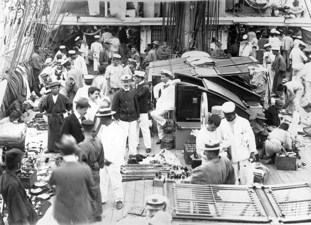 Chinesische Händler an Bord eines Schiffes im Hafen von Dili